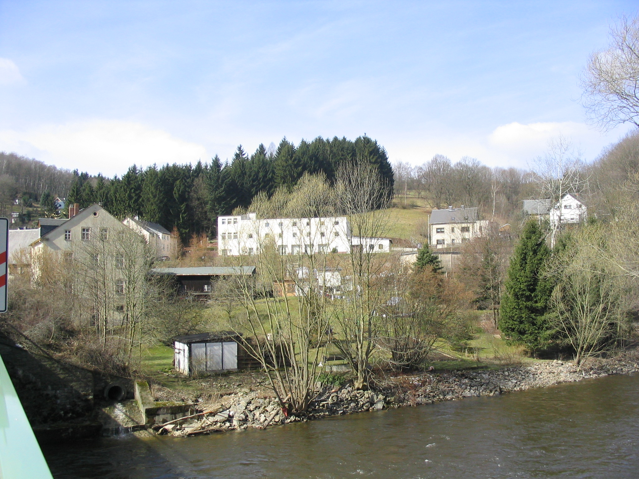 Blick von der Zschopaubrücke auf das gegenüberliegende Ufer in Zschopenthal, Aufgenommen am 15.04.2006 von Dr. Hagen Graebner